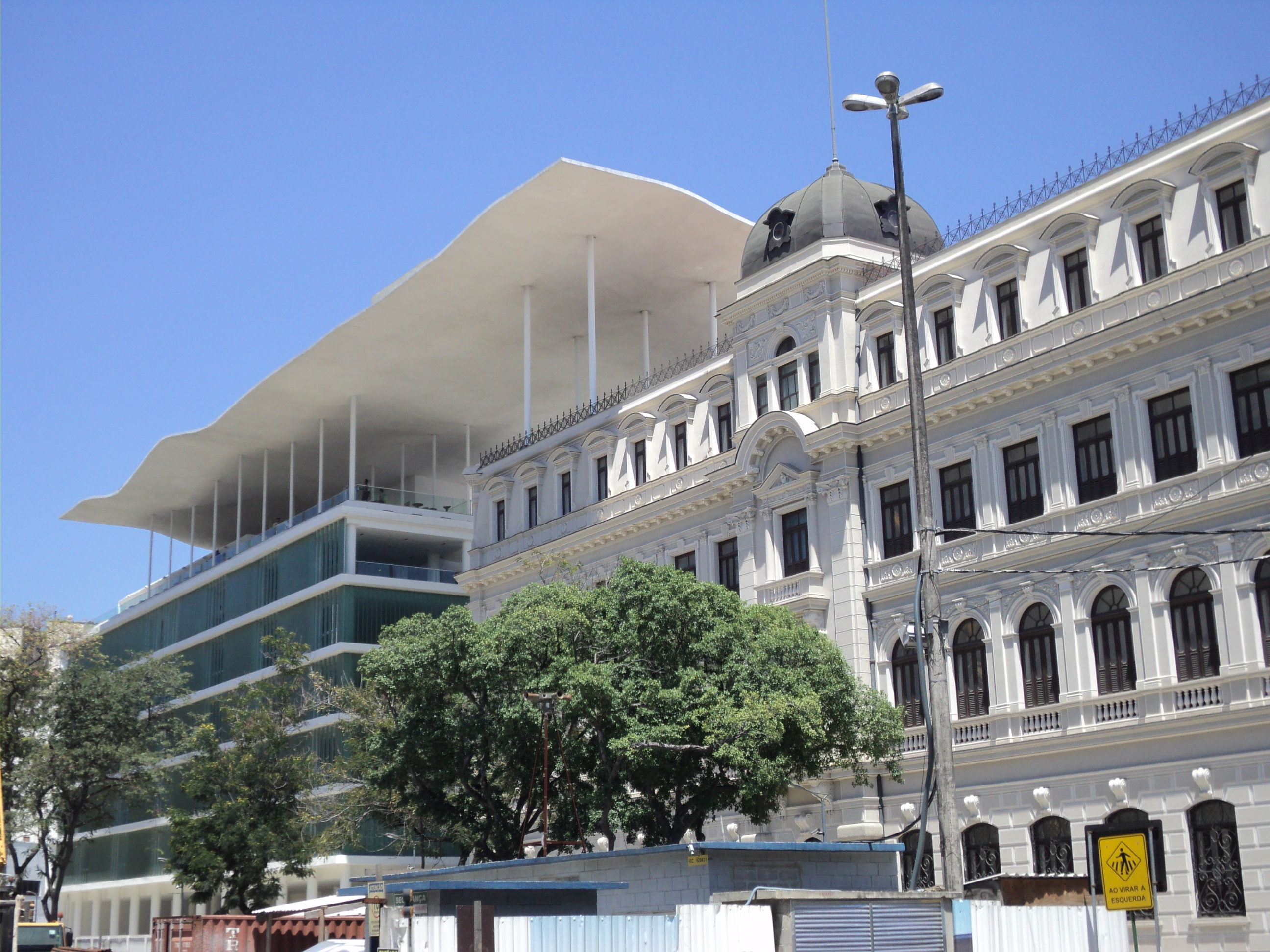 Visão geral do Museu de Arte do Rio (direita), da Escola do Olhar (esquerda) e a cobertura fluída que liga as duas edificações.